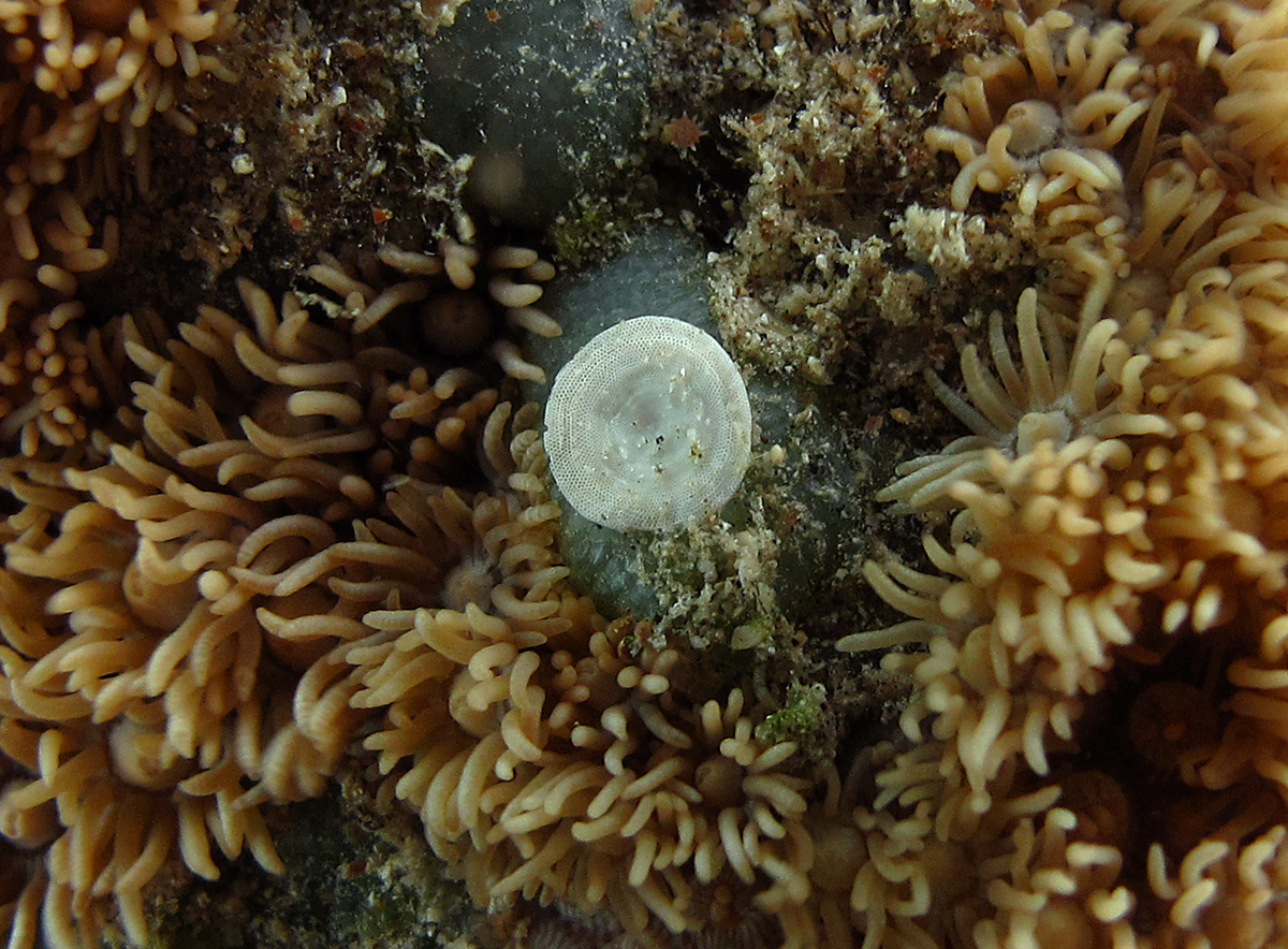 Un foraminifère identifié comme Amphisorus hemprichii à la Réunion.